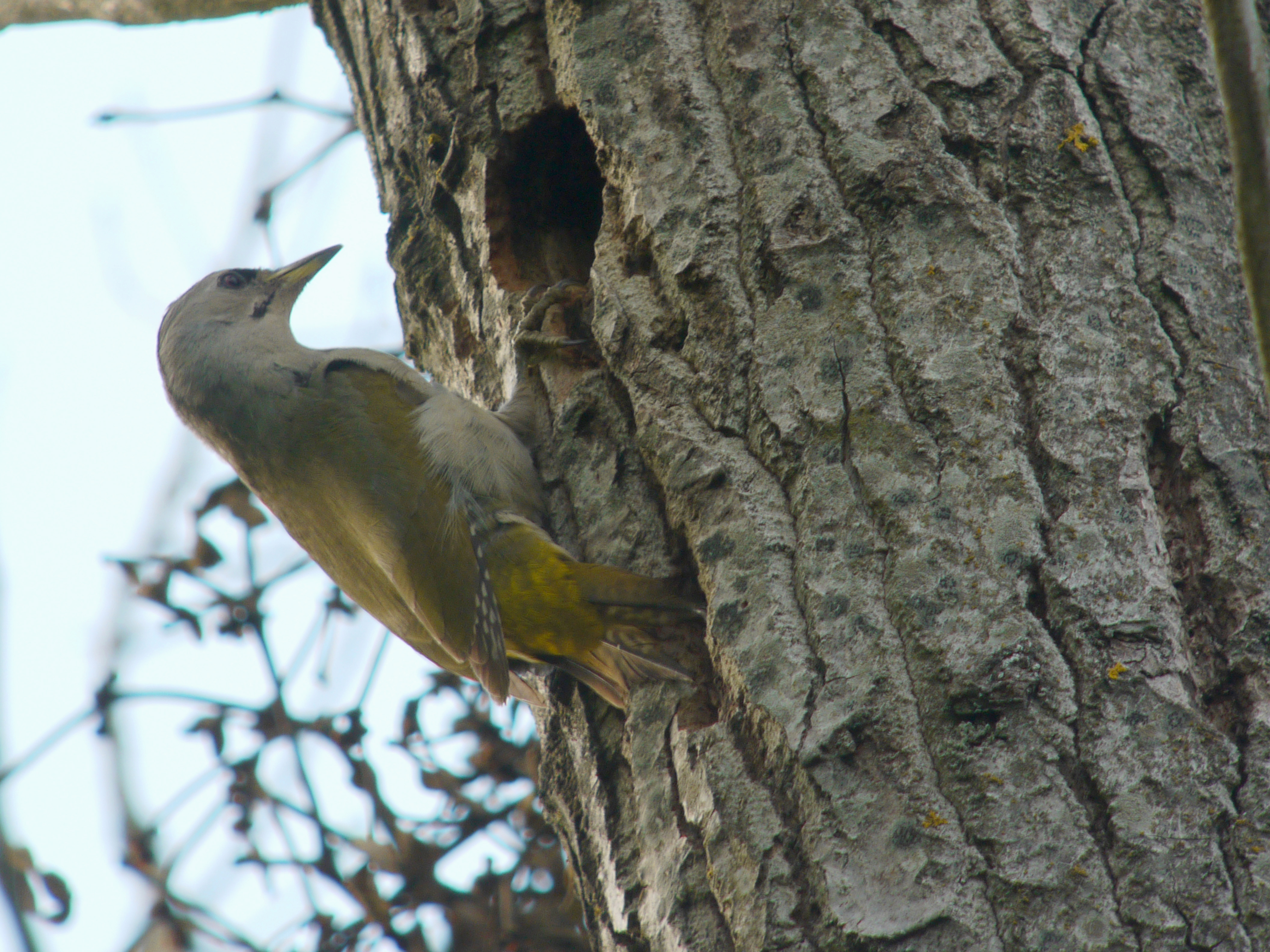 Swarowski 80 HD 30 X, Panasonic DMC-GF1 + Lumix G 20mm F1.7 ASPH (Adapter DCB)